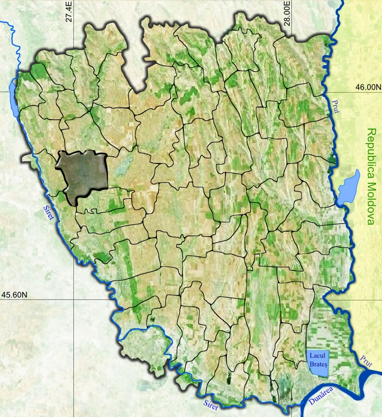 Tecuci jud Galati.